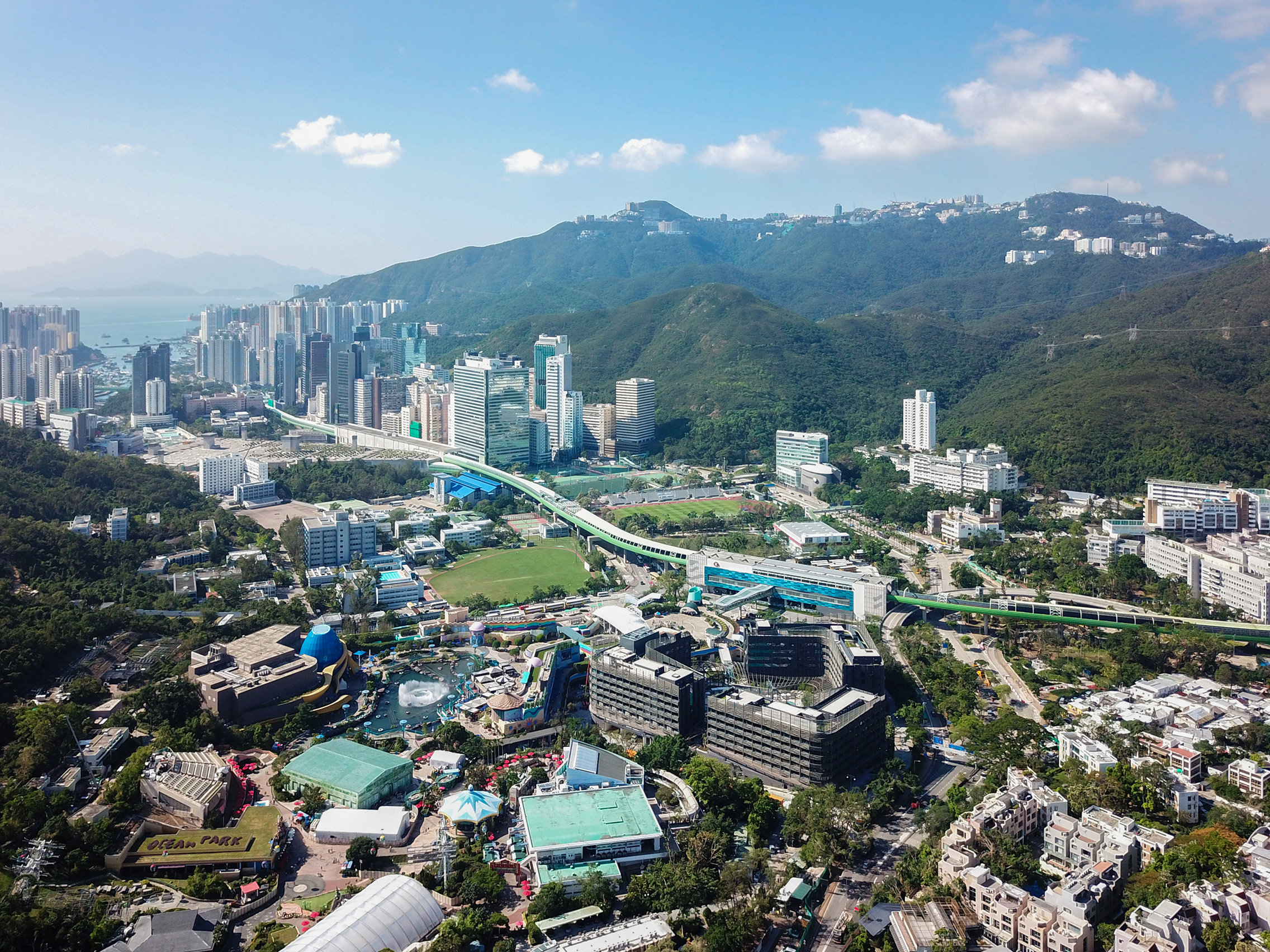 Wong Chuk Hang Aerial view